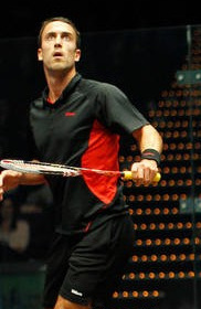 Peter Barker during 2011 Australian Open